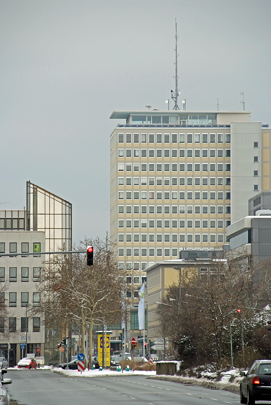 Plärrerhochhaus (Städtische Werke) Nürnberg